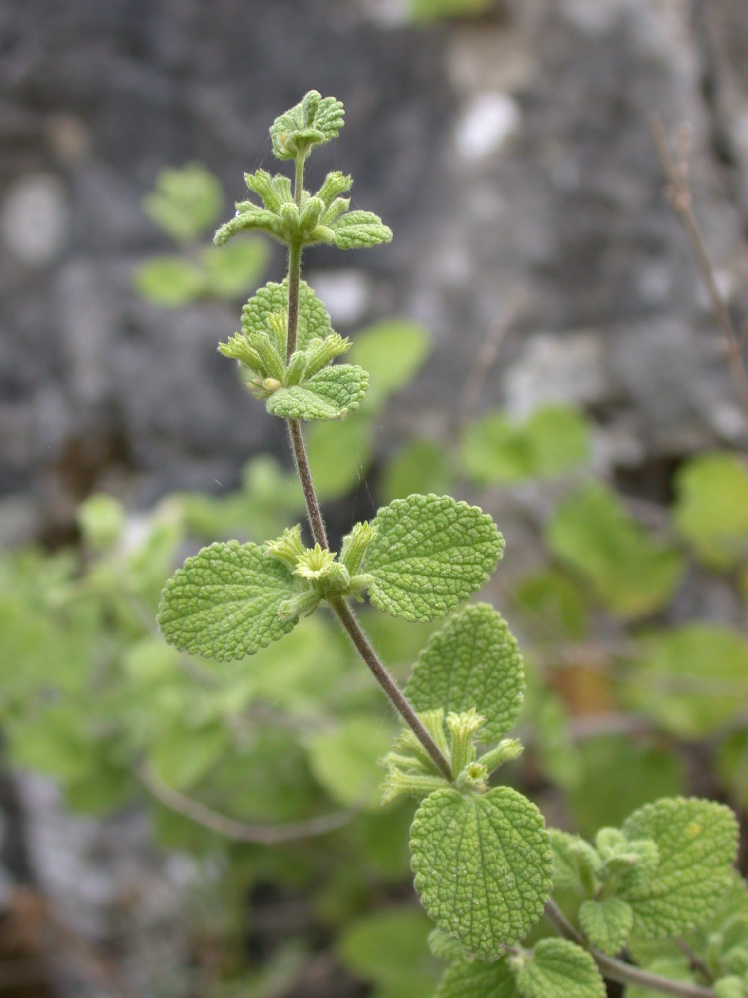 Ballota saxatilis Sieber ex C.Presl (בלוטת הסלעים, גלונית הסלעים), Mount Carmel, Israel, May 7, 2006.